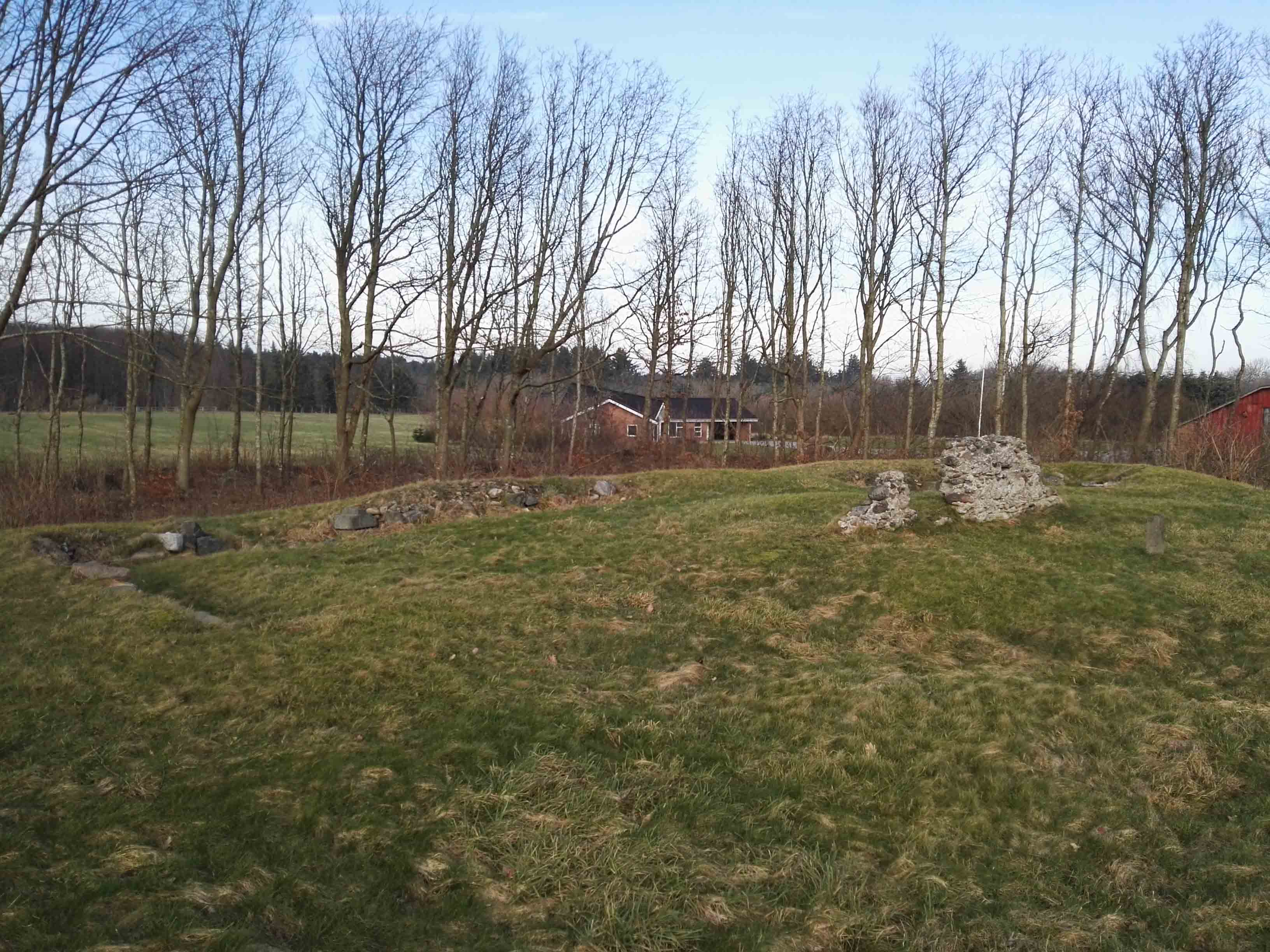 Tvorup Kirkeruin, overblik